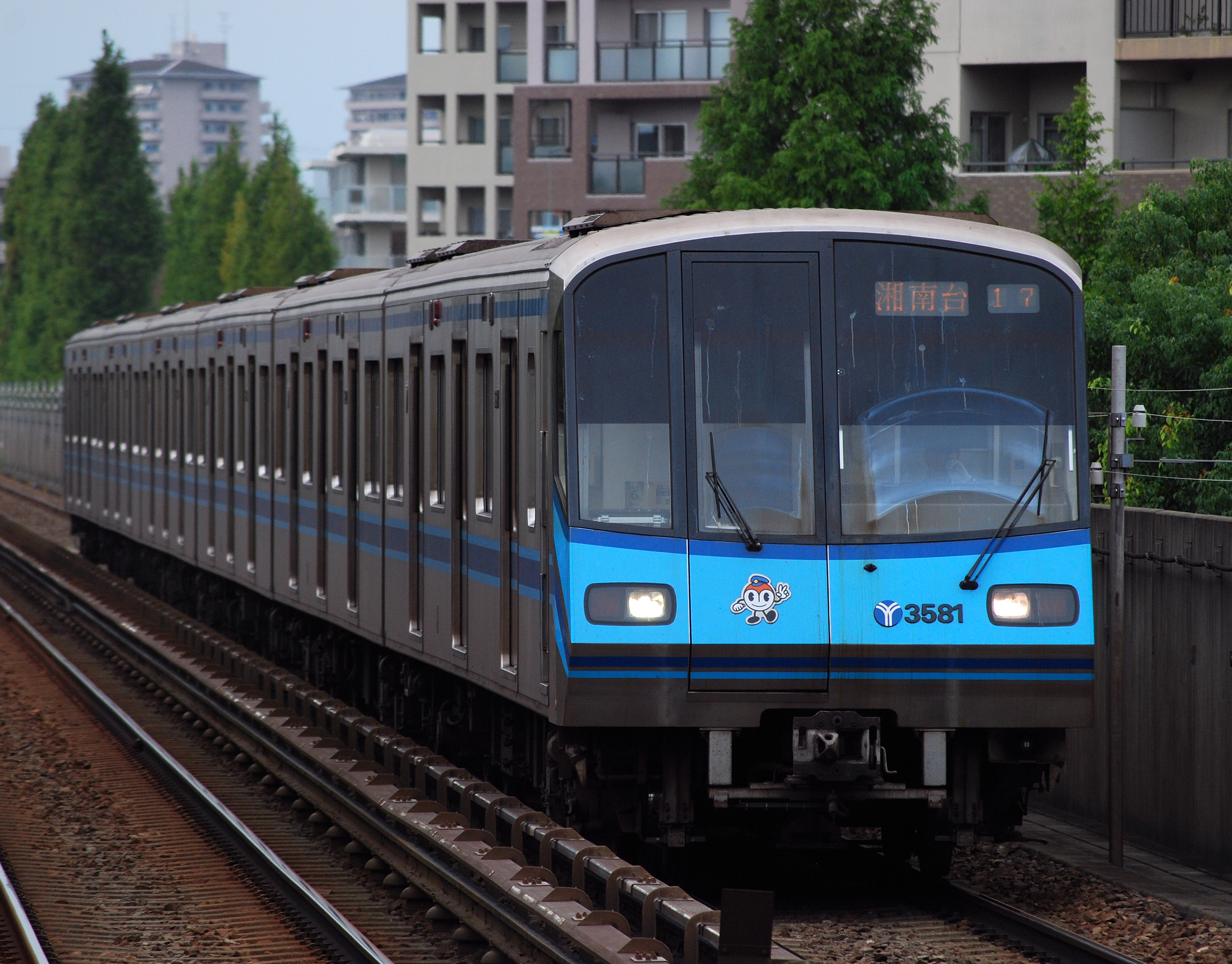 横浜市営地下鉄3000S系（仲町台駅で撮影）